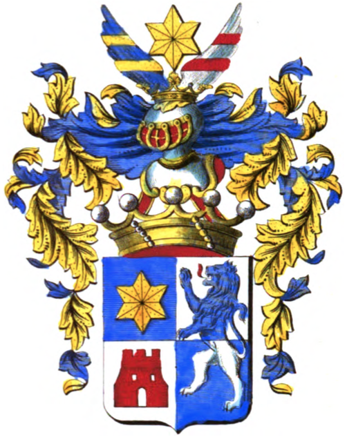 Armoiries de la branche cadette de la famille de Biolley